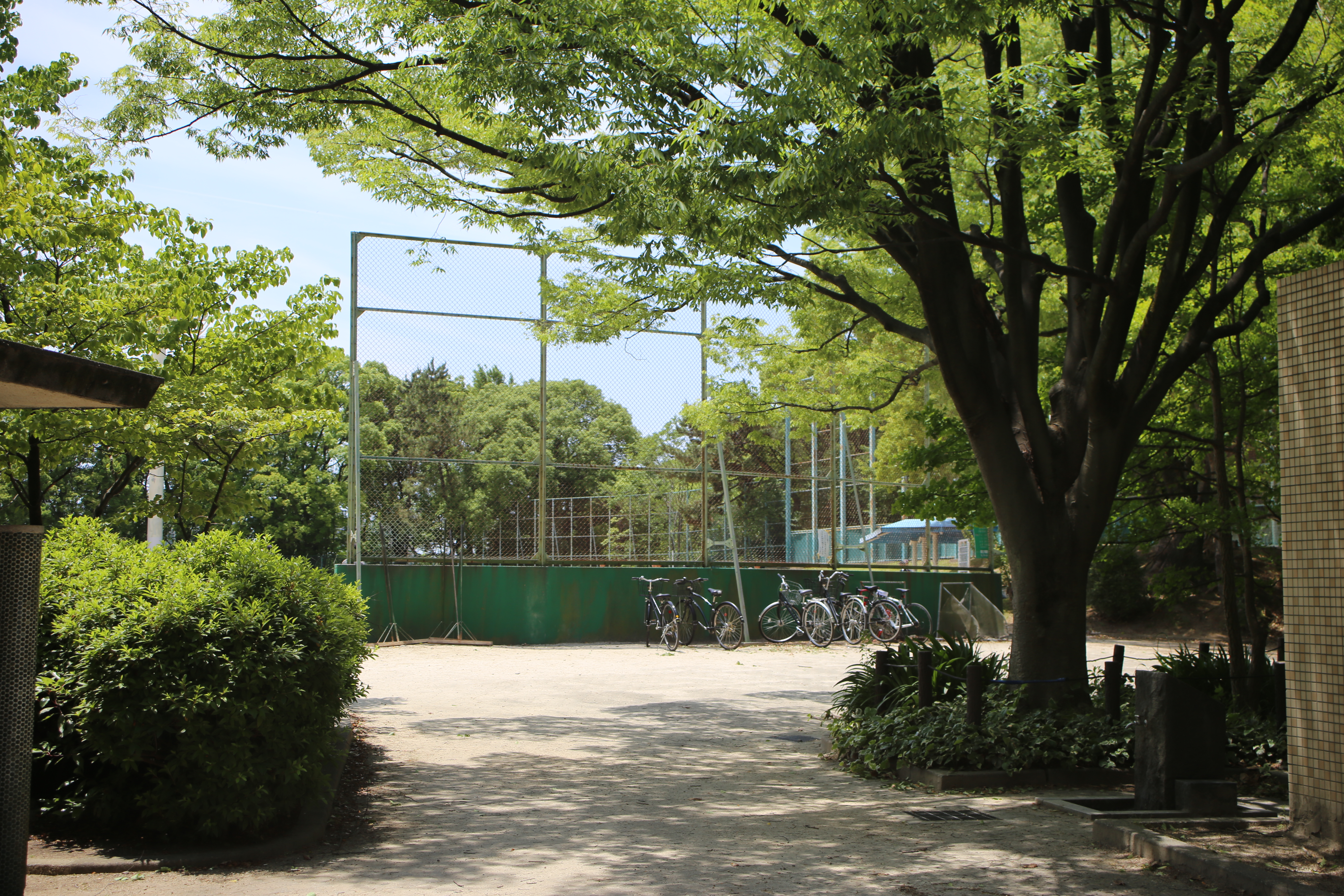 名古屋市昭和区鶴舞の鶴舞公園野球場